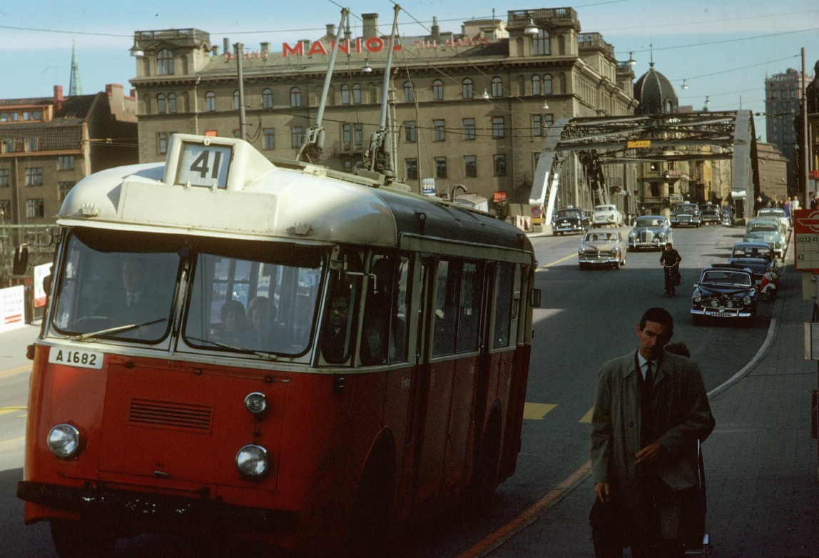 Kungsbroviadukten i Stockholm